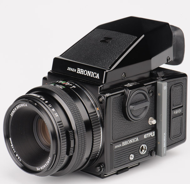 Bronica ETRSi with Zenzanon PE 80/2.8